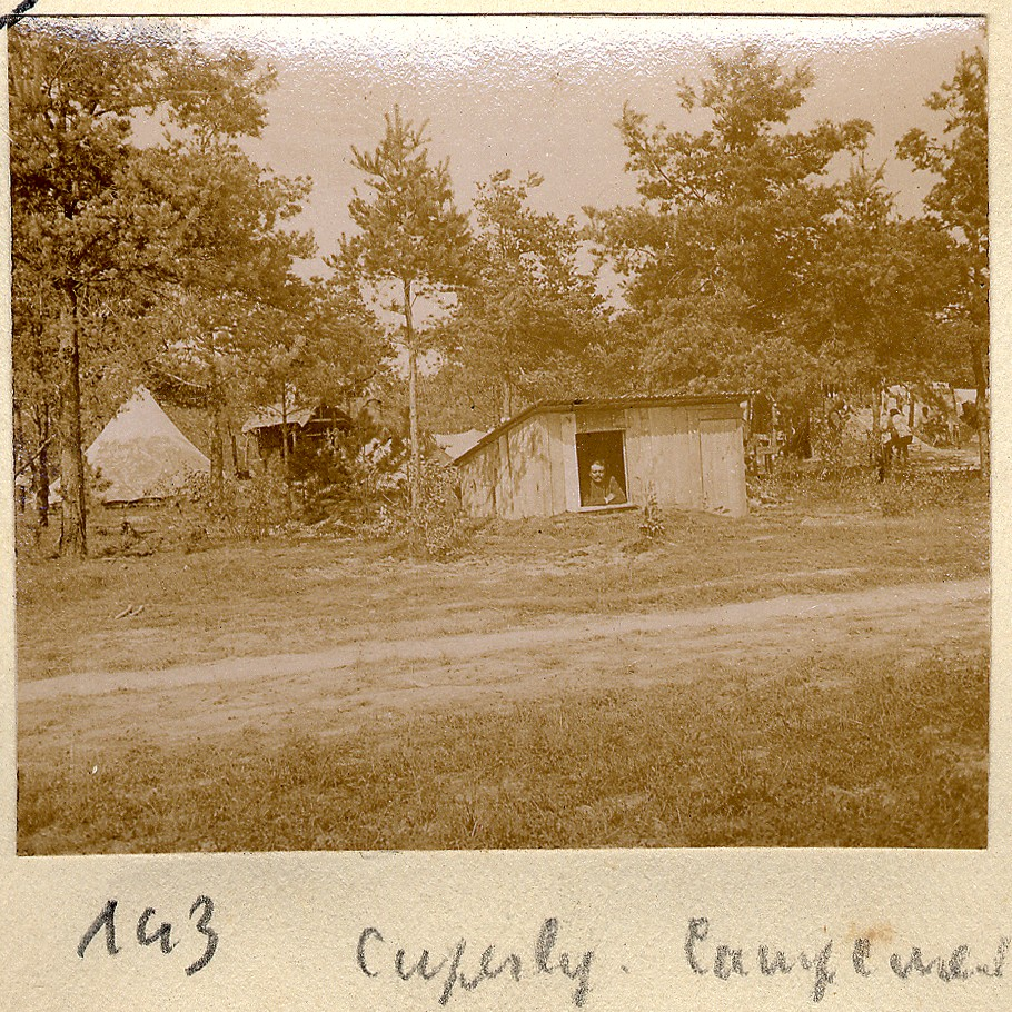 Vue d'ensemble du campement du 7e régiment d'Artillerie basé à Cuperly (Marne). 1916. Guerre 1914-1918.